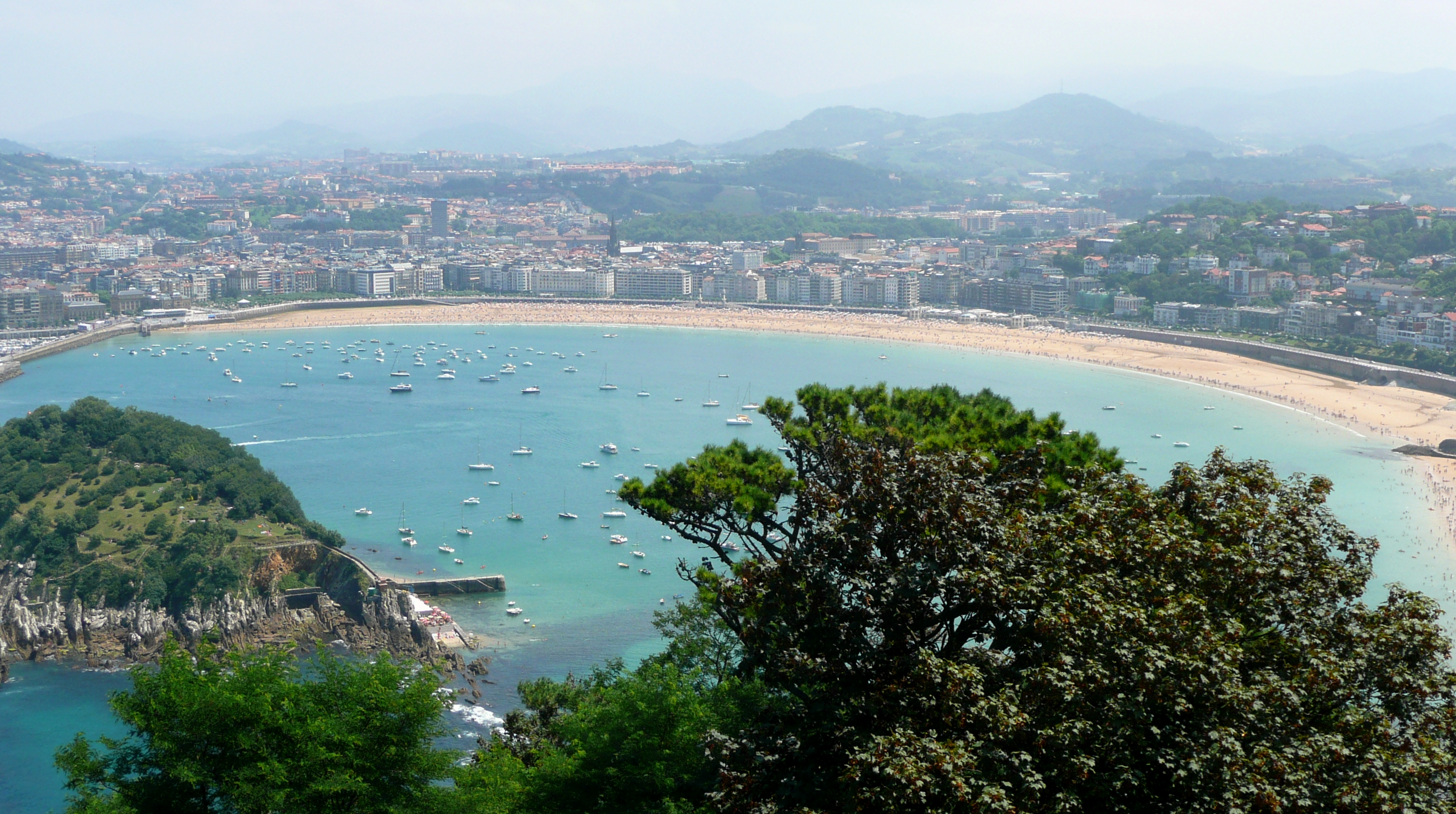 Bahía de La Concha, San Sebastian